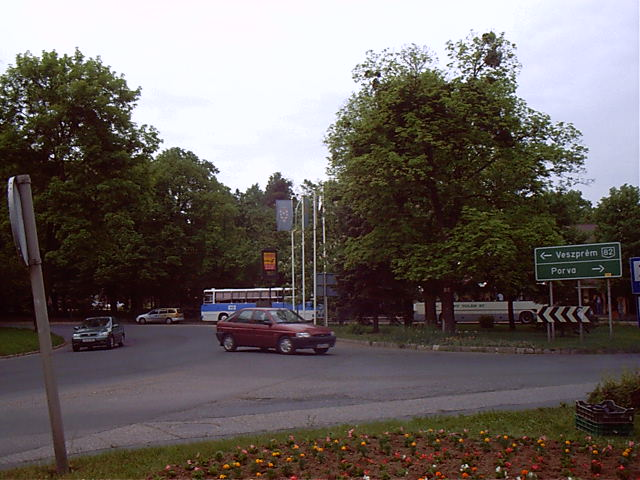 A 82-es főút kanyarulatában lévő autóbusz-állomás Zircen